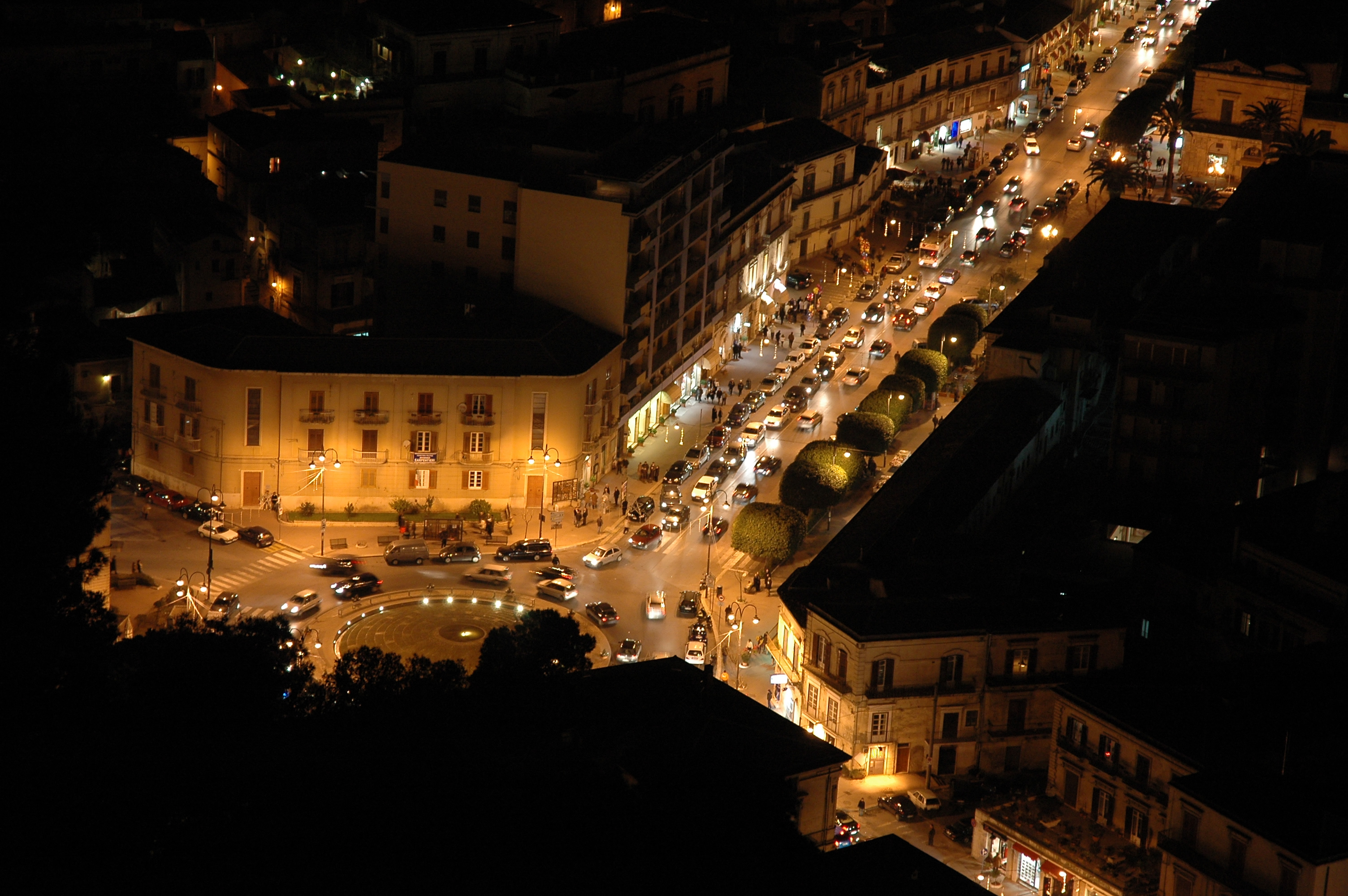 Modica by night.